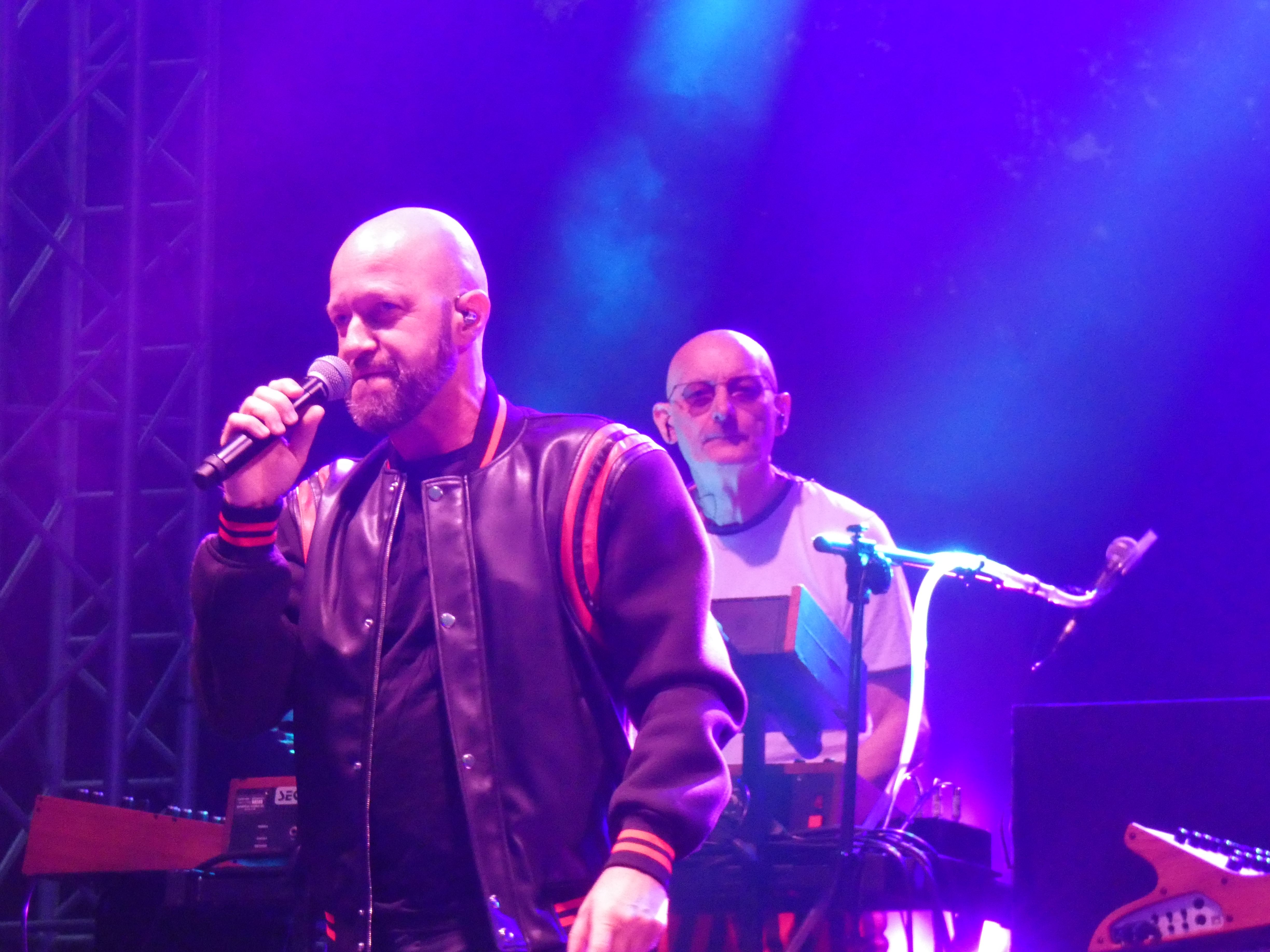 Kombi, Nowa Dęba 2019-06-16